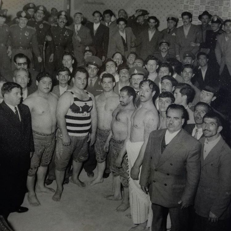 علی کیانتاش ،حمزه پهلوان پور و مرشد جعفر شیر خدا